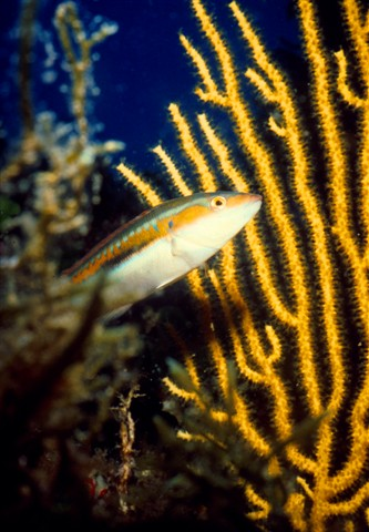 Area Marina Protetta Capo Gallo, Palermo, Sicily Coris julis e Eunicella cavolinii (Secca Palidda)